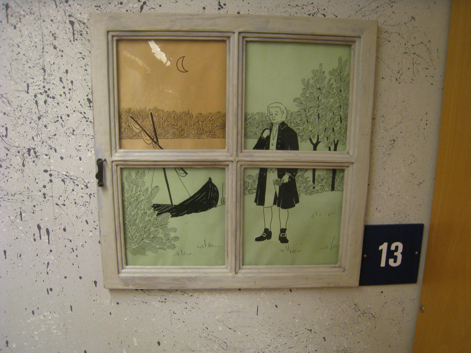 Koffsanmuseet på Jakobsbergs bibliotek i Järfälla kommun.